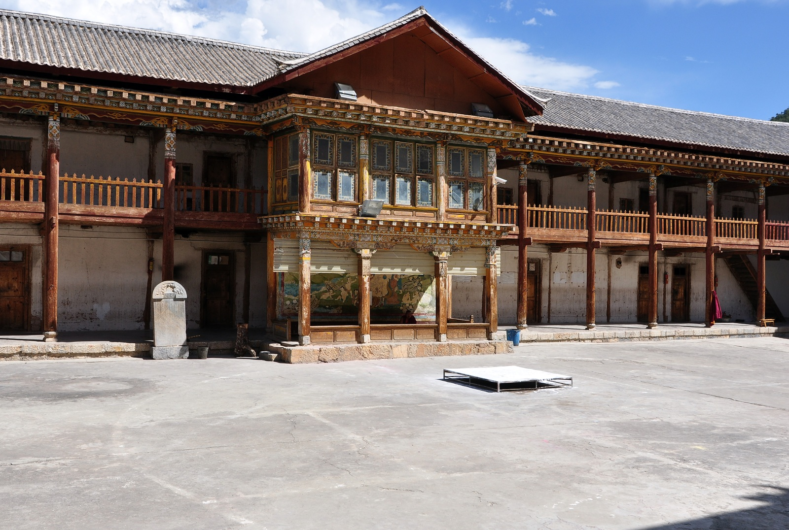 Dongzhulin Monastery